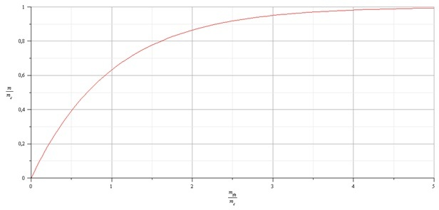 Modèle de Janssen : profil de la masse mesurée en fons de silo en fonction de la masse versée dans le silo (variables réduites)